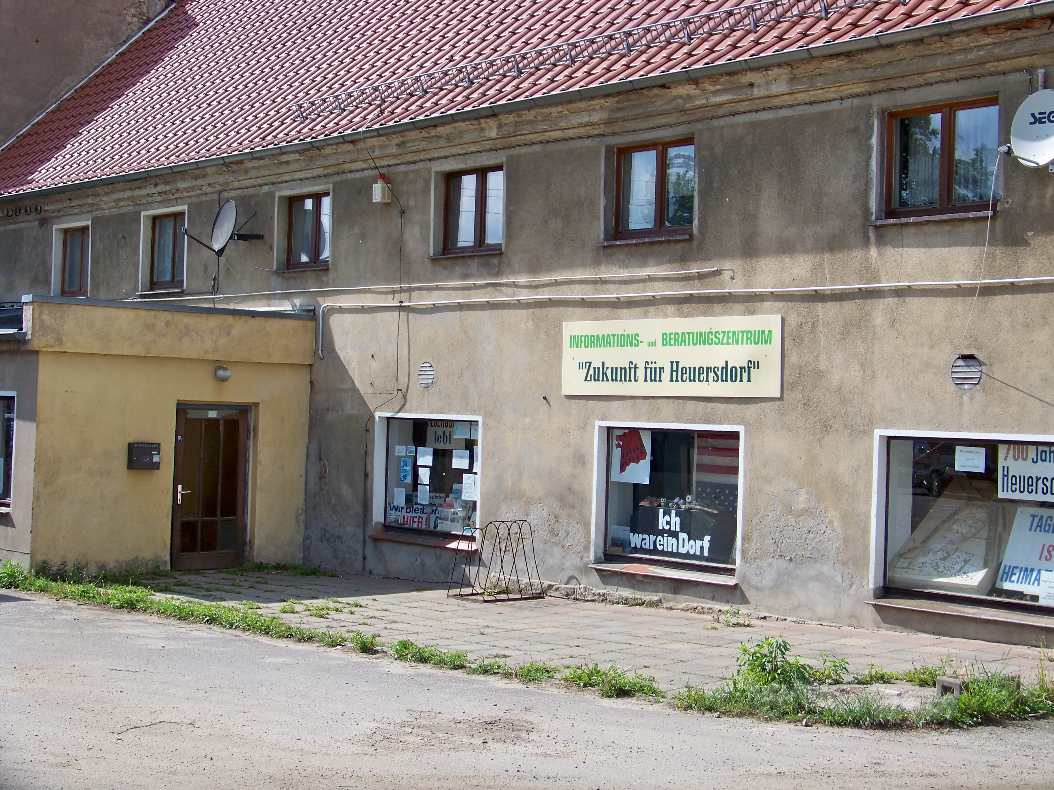 Ehemaliges Gemeindehaus in Heuersdorf: immer noch währender stiller Protest gegen den Abriss des Dorfes (Mai 2009).